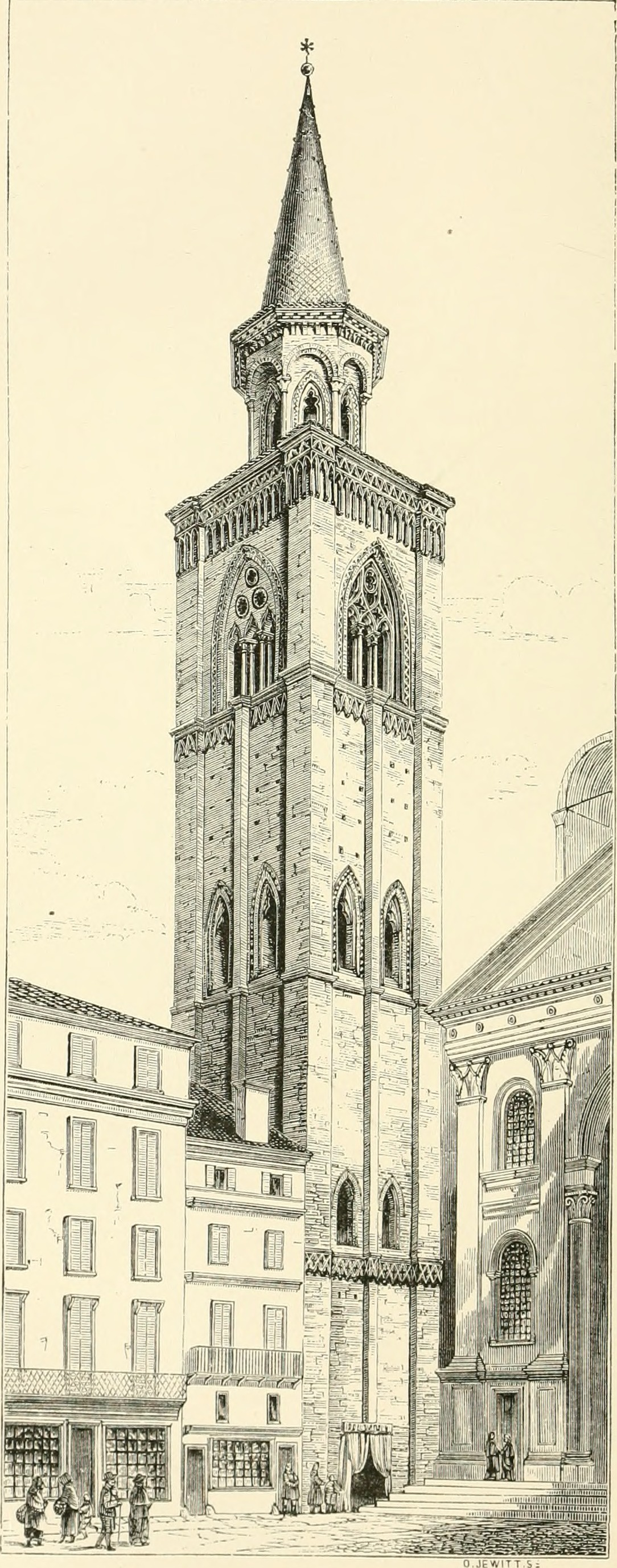 Campanile di Sant'Andrea a Mantova nell'anno 1874.